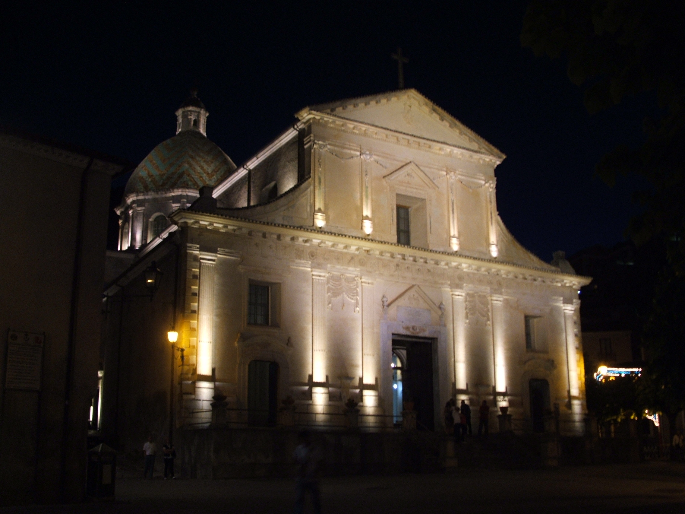 foto dell'utente Marco.bellizzi; FACCIATA DELLA CHIESA DI SANTA MARIA MADDALENA (notturna) - Morano Calabro